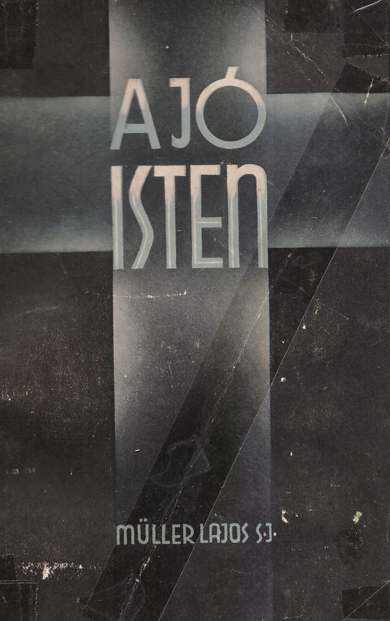 Müller Lajos (1874-1945): A jó Isten (1935)